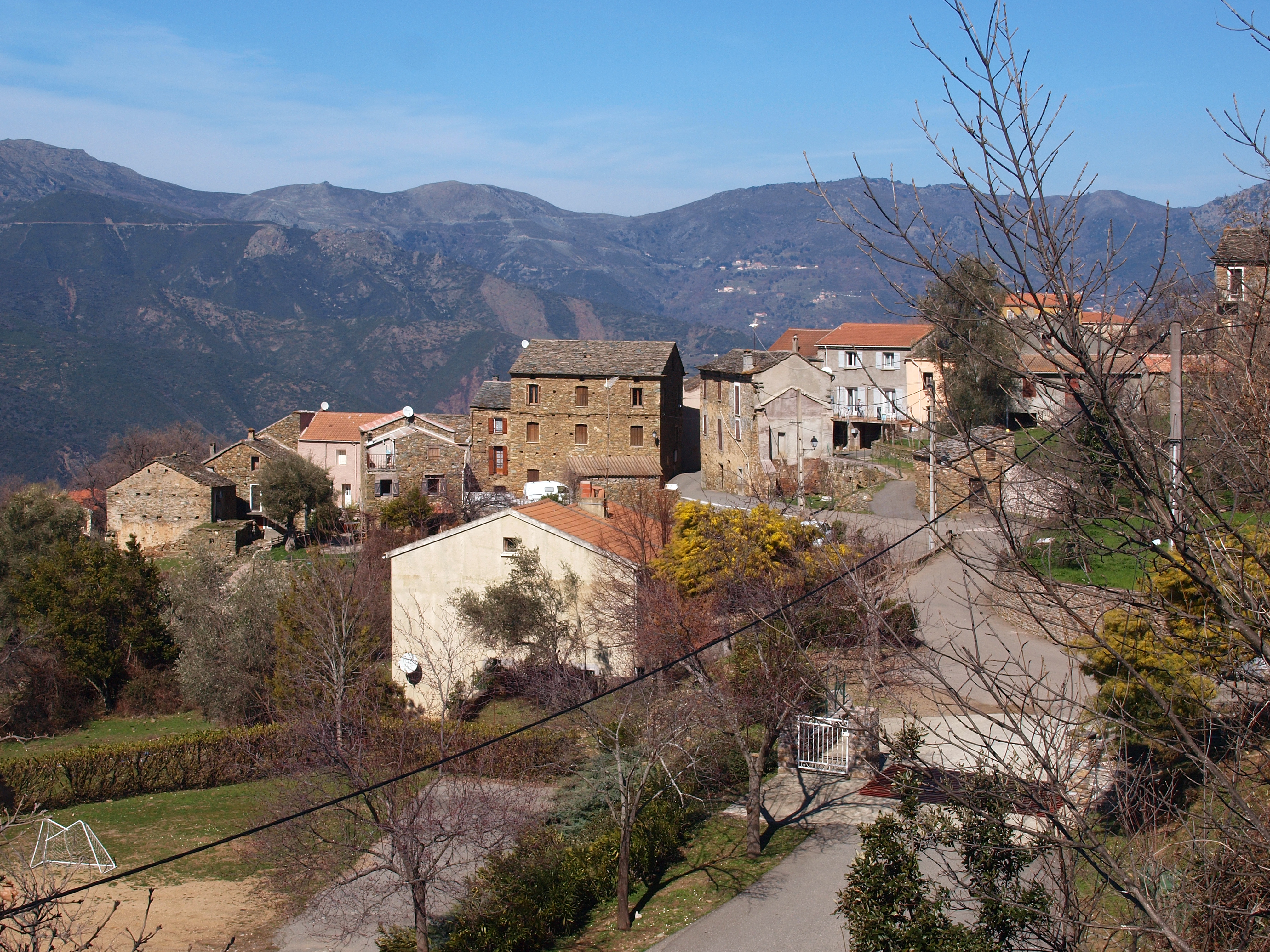 Corsu: E Valle di Rustinu, Rustinu (Corsica) - Paese di Valle